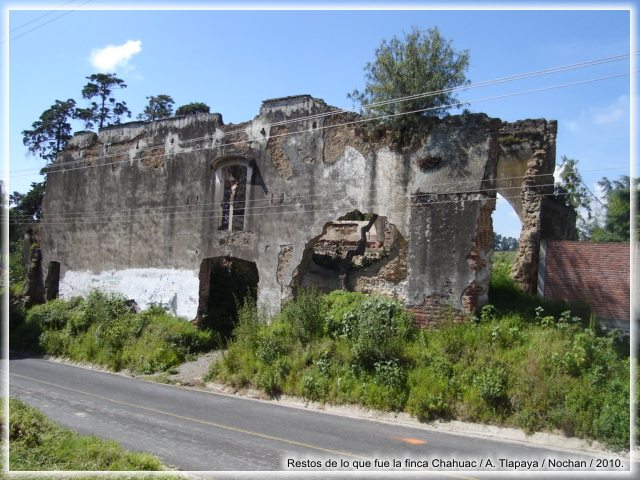 Restos de lo que fue la Finca Cháhuac, en Domingo Arenas, Pue.